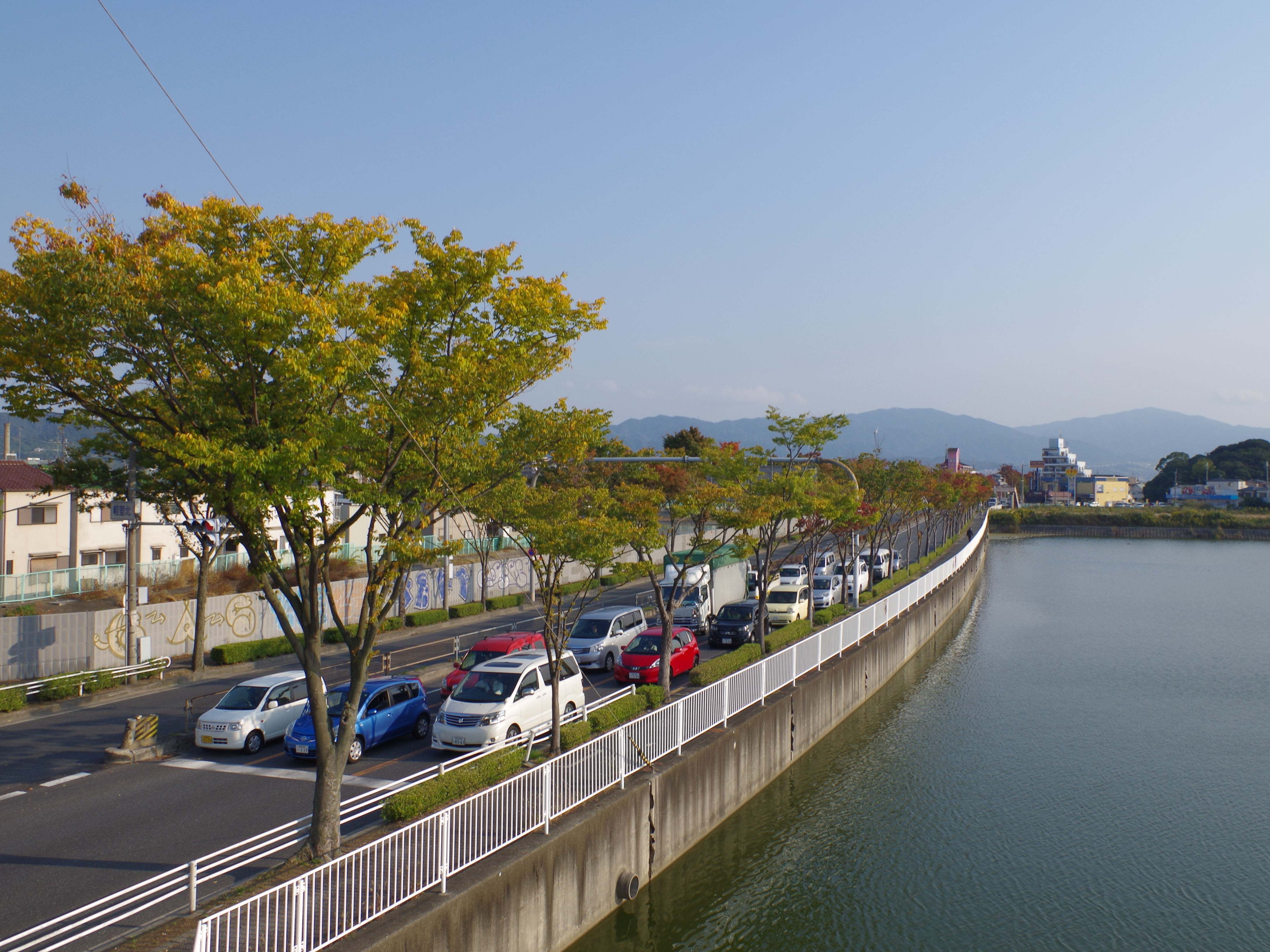 大阪外環状線(国道170号) 軽里北交差点付近 Karusato-kita 2012.10.30